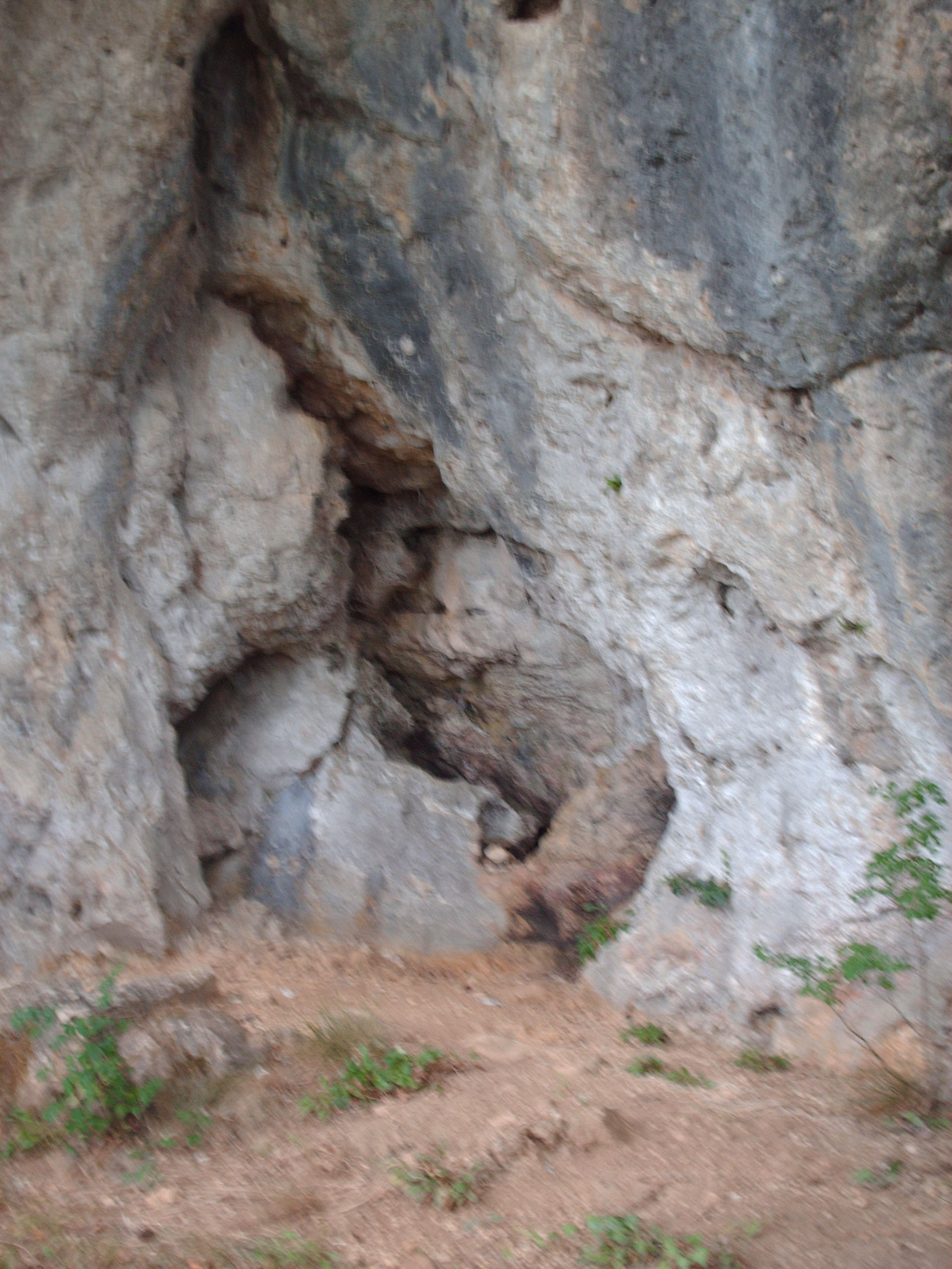 le premier habitat : le puit de jacob